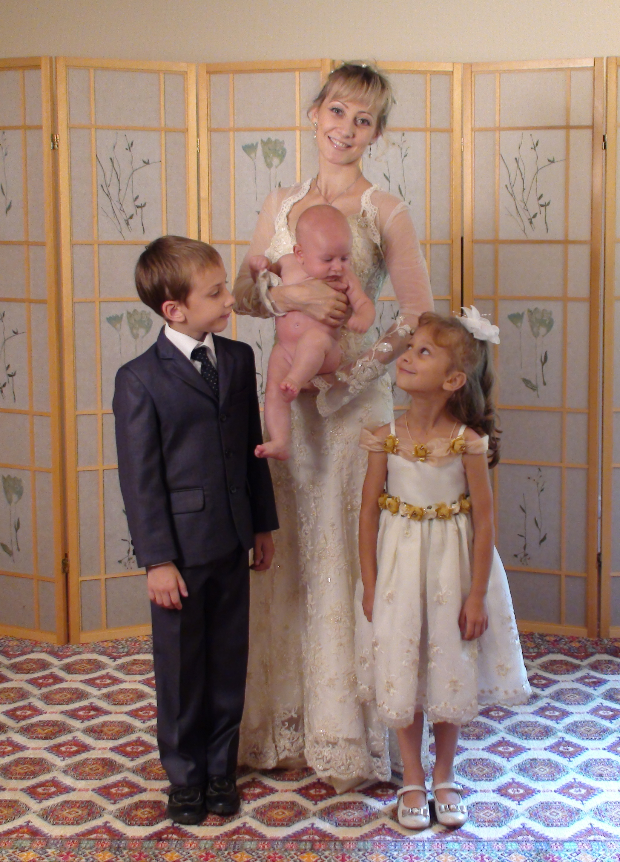 Балерина Наталья Огнева с детьми